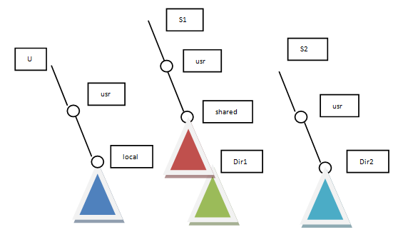 3 bestandssystemen voor en na het mount proces